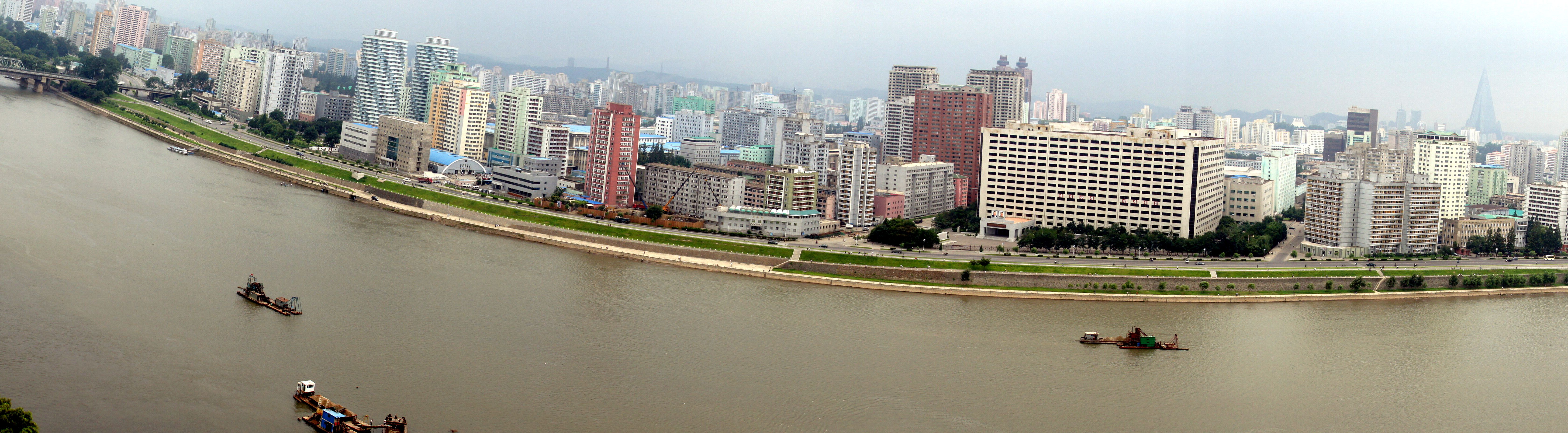 Vista parcial panorámica desde el Yanggakdo International Hotel